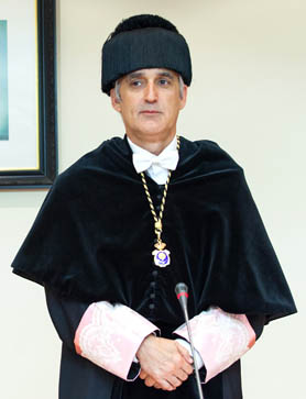 El antiguo rector de la Universidad de La Rioja, José Arnáez Vadillo.